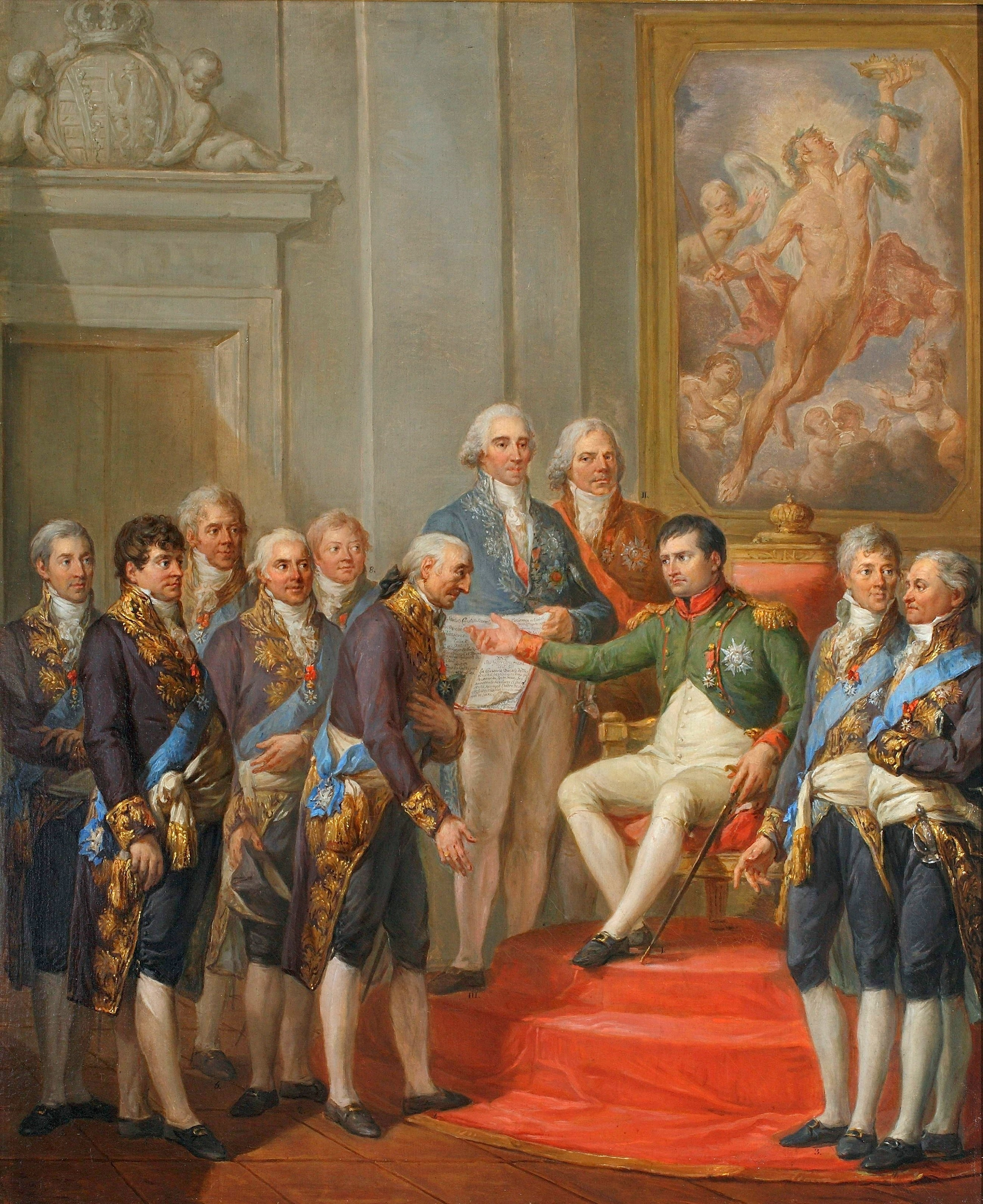 Portrait of Napoleon, Talleyrand, Hugues-Bernard Maret duc de Bassano, Stanisław Małachowski, Ludwik Szymon Gutakowski, Stanisław Kostka Potocki, Józef Wybicki, Ksawery Działyński, Paweł Bieliński, Władysław Sobolewski, Juliusz Łuszczewski.